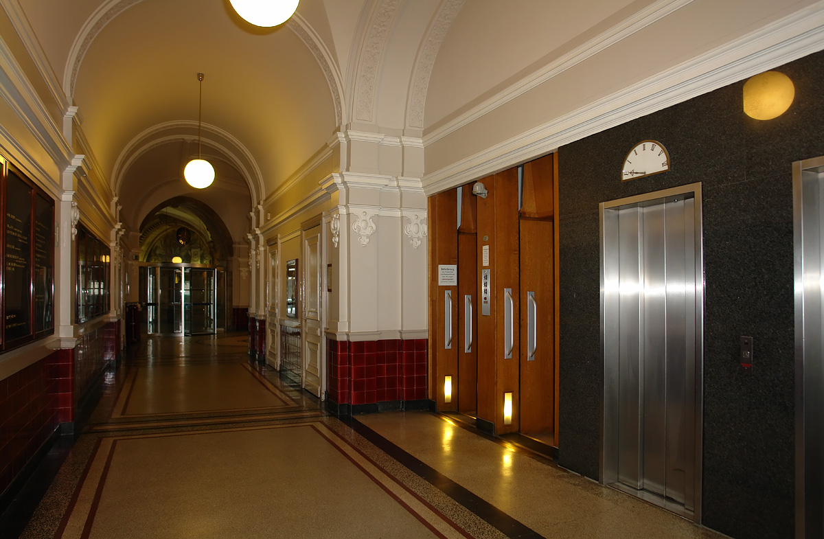 Baumwollbörse in Bremen. Flur im Erdgeschoss mit Fahrstuhl und Paternoster